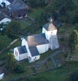 Steinborn (Daun), kath. Kirche St. Lambertus